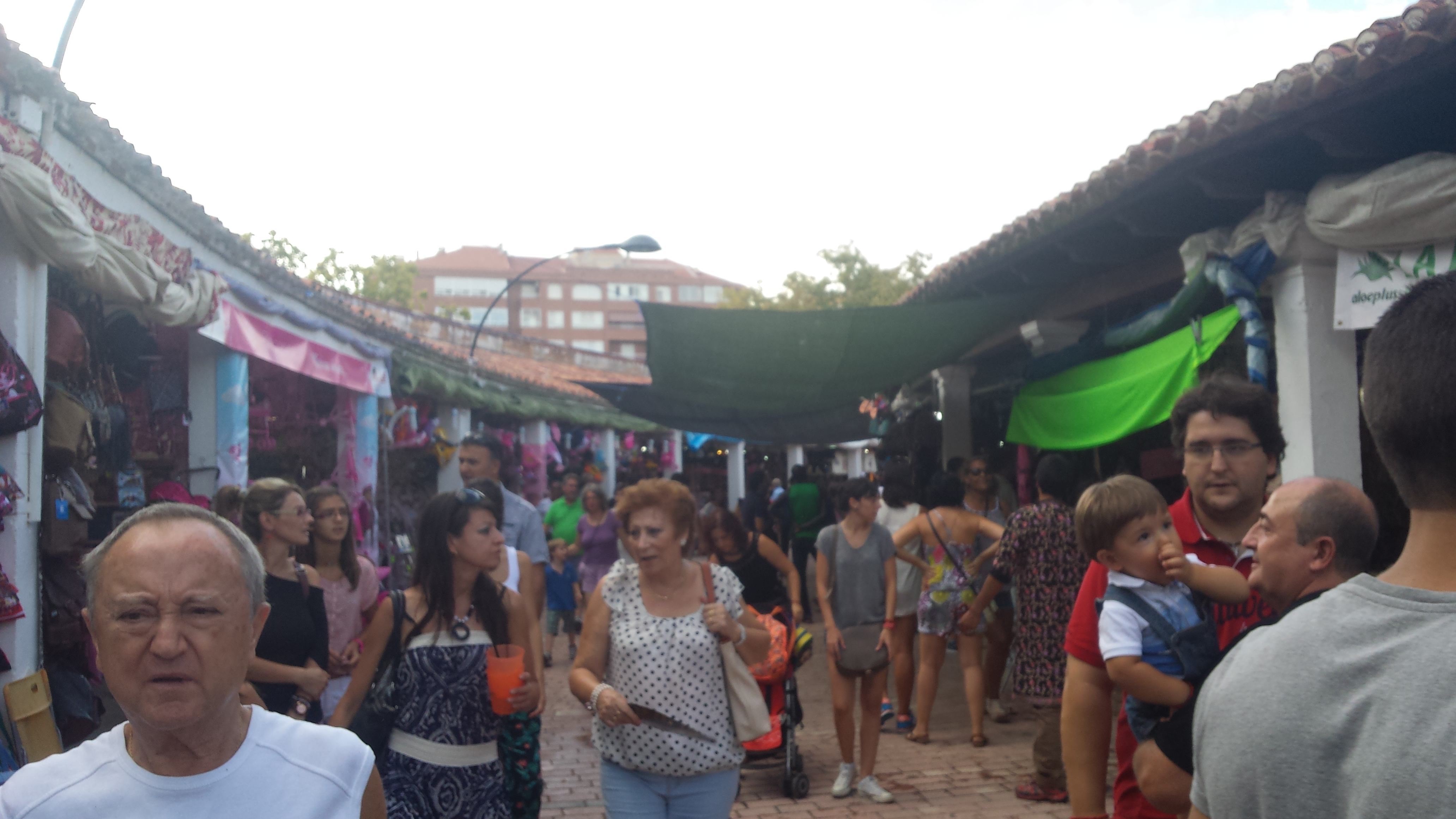 Anillo interior del Recinto Ferial de Albacete. Feria de Albacete